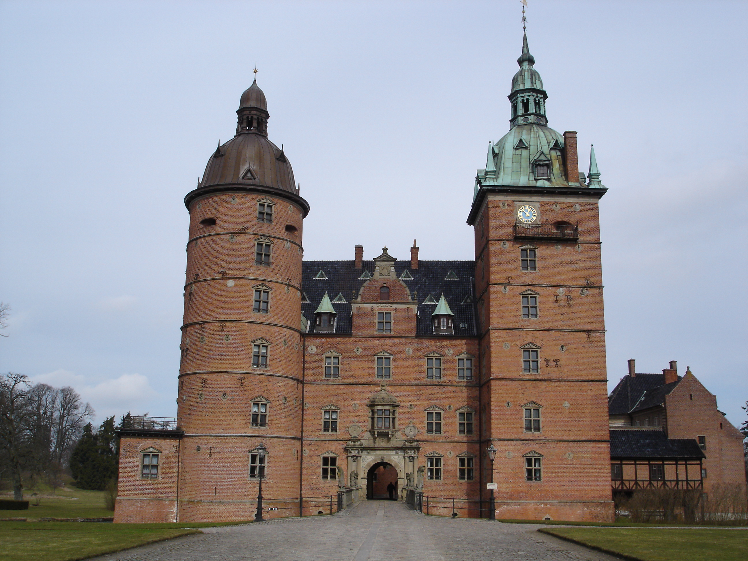 Author: User:Zserghei Vallø Castle. Front view.